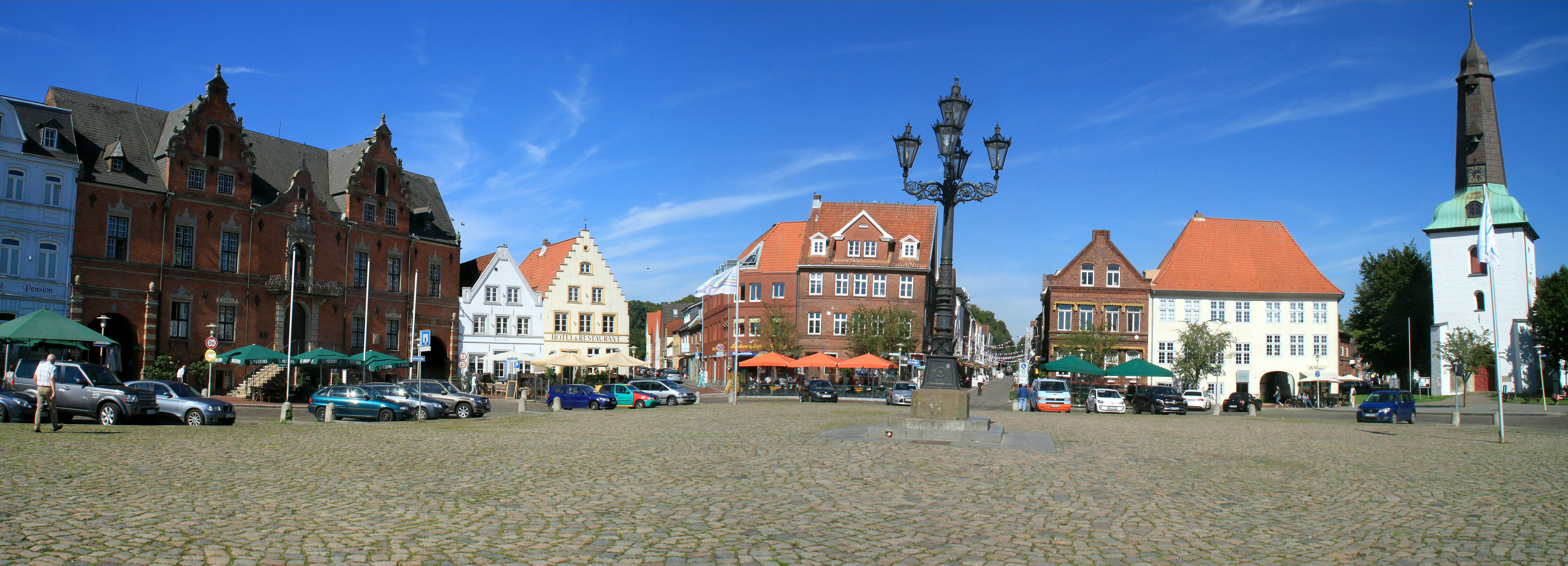 Marktplatz mit Rathaus, Kandelaber, Stadtkirche